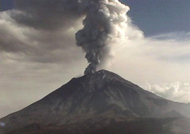 Popocatépetl (Mexiko) 19.12.2000, 19:48 GMT